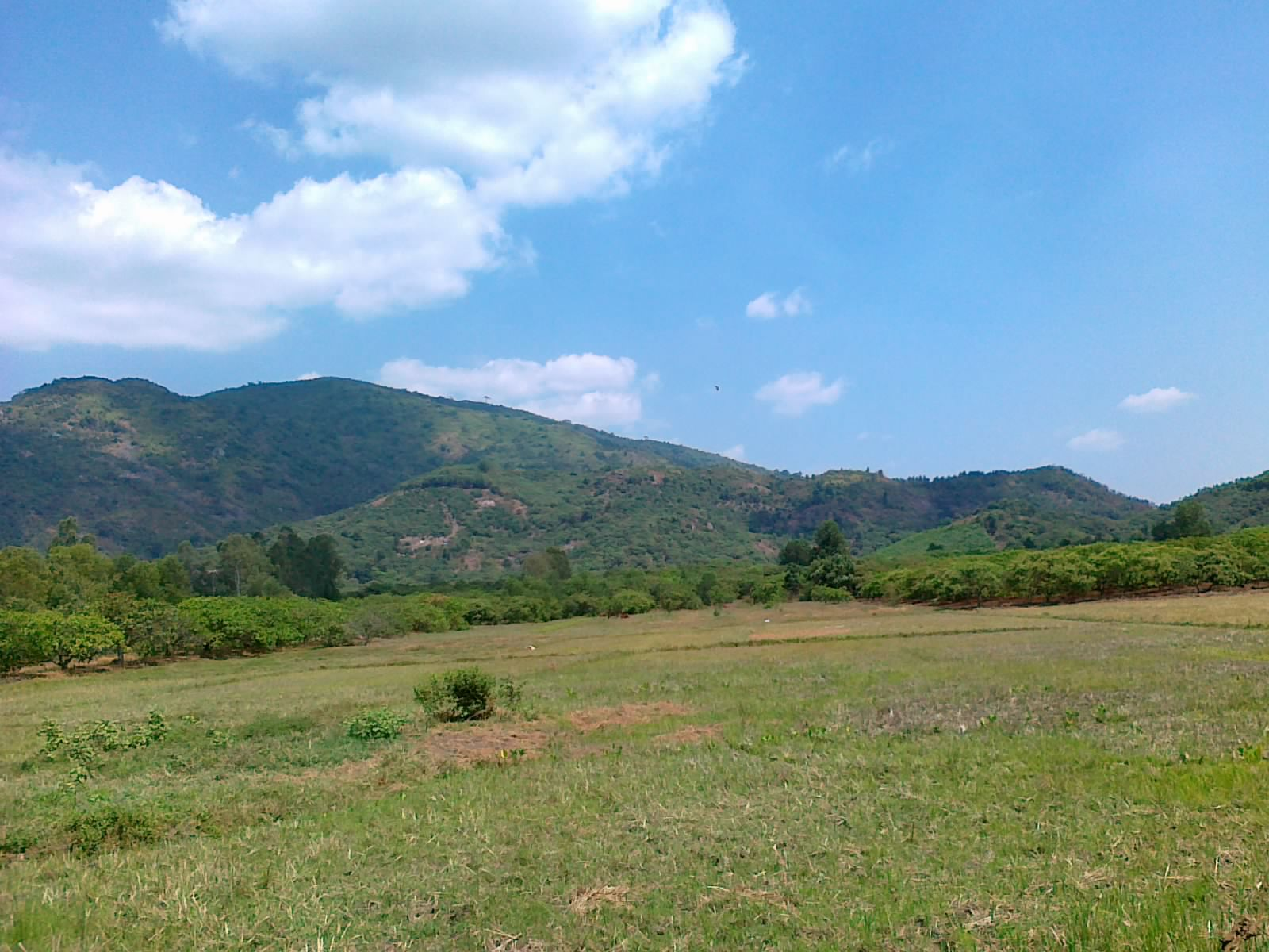 Xuân Lộc, Đồng Nai, Việt Nam